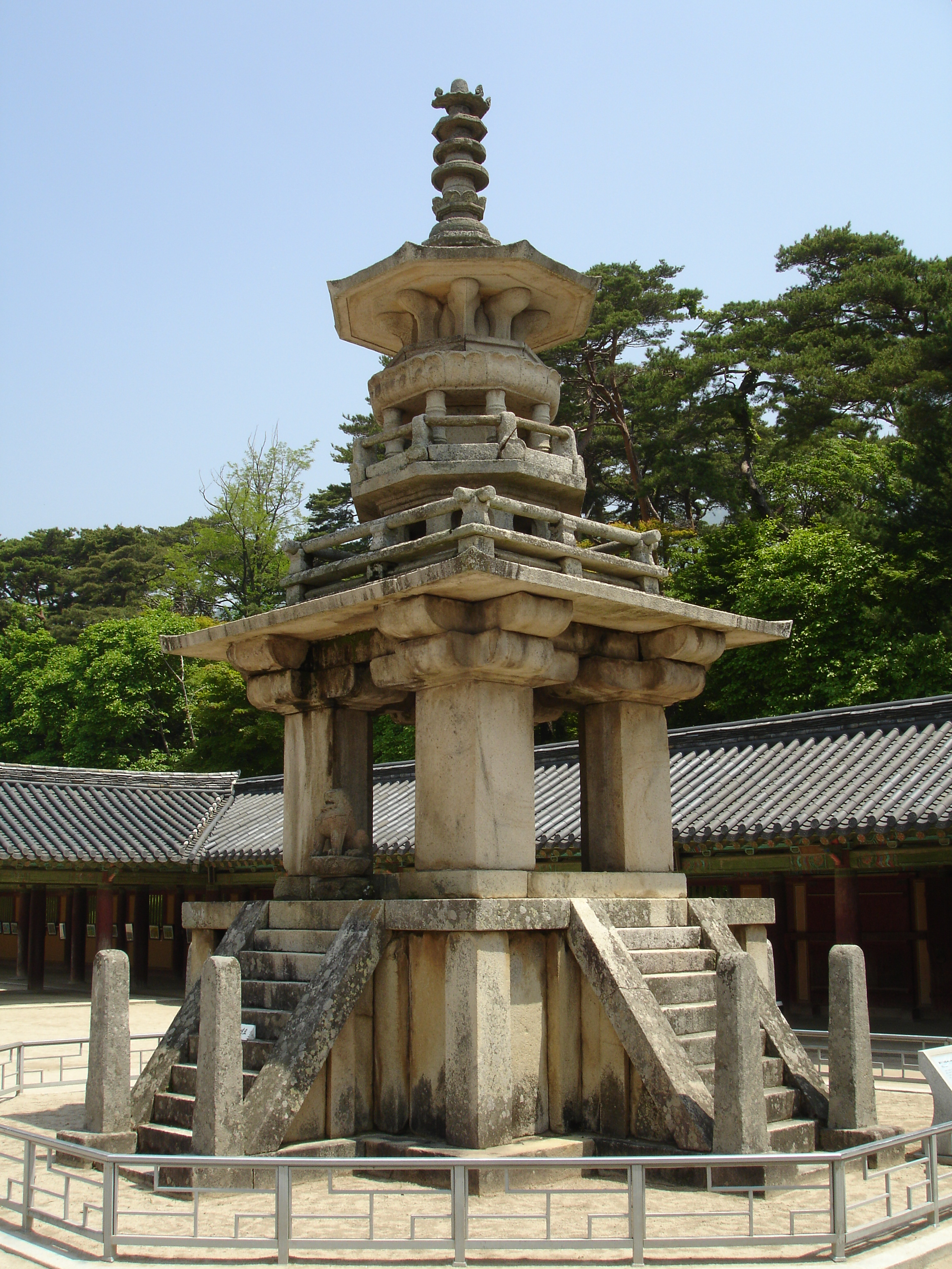 경주 불국사 다보탑 #WLM2016, #WLMKorea